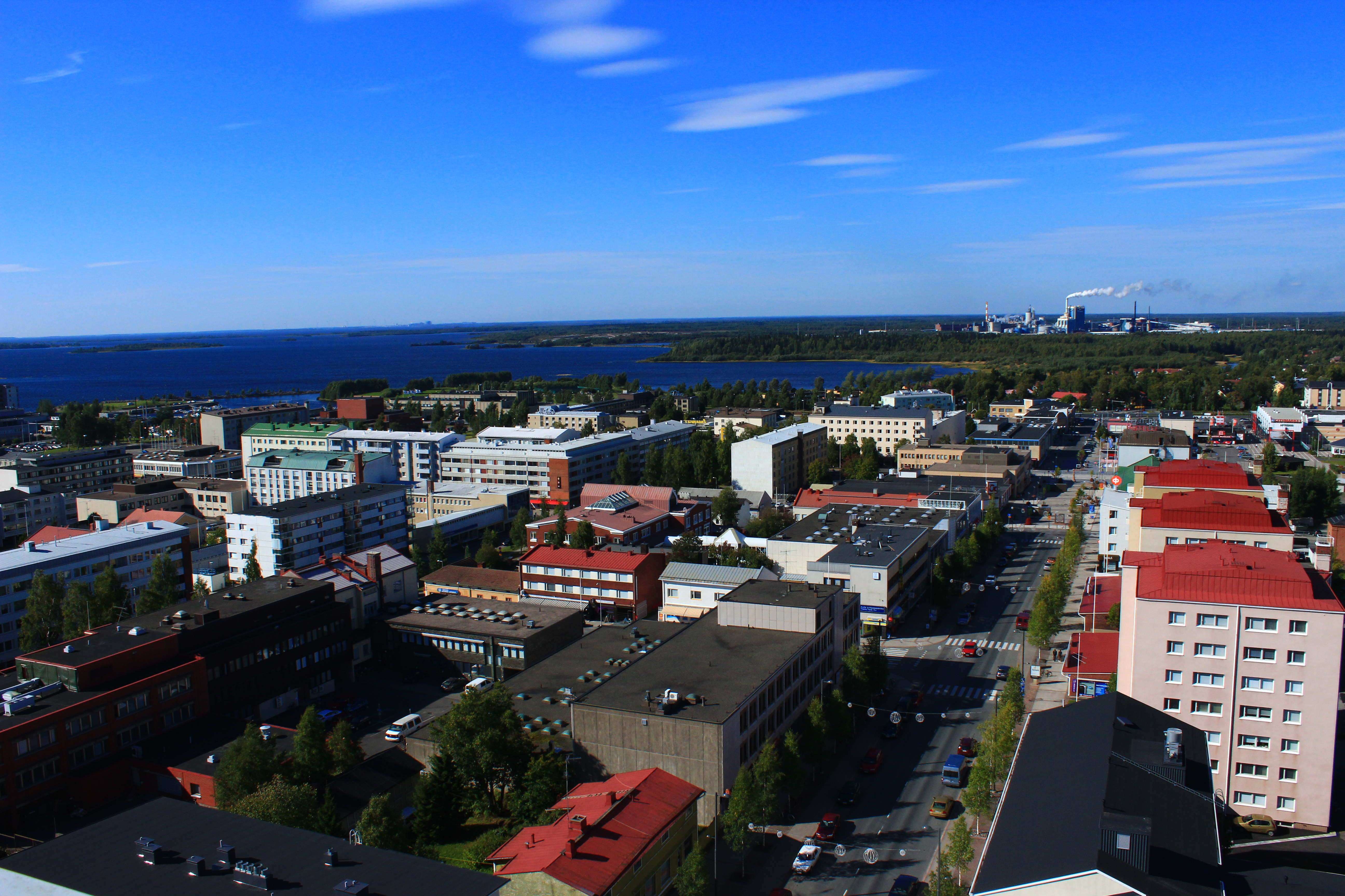 Kaupunkiäkymä kaupungintalon katolta